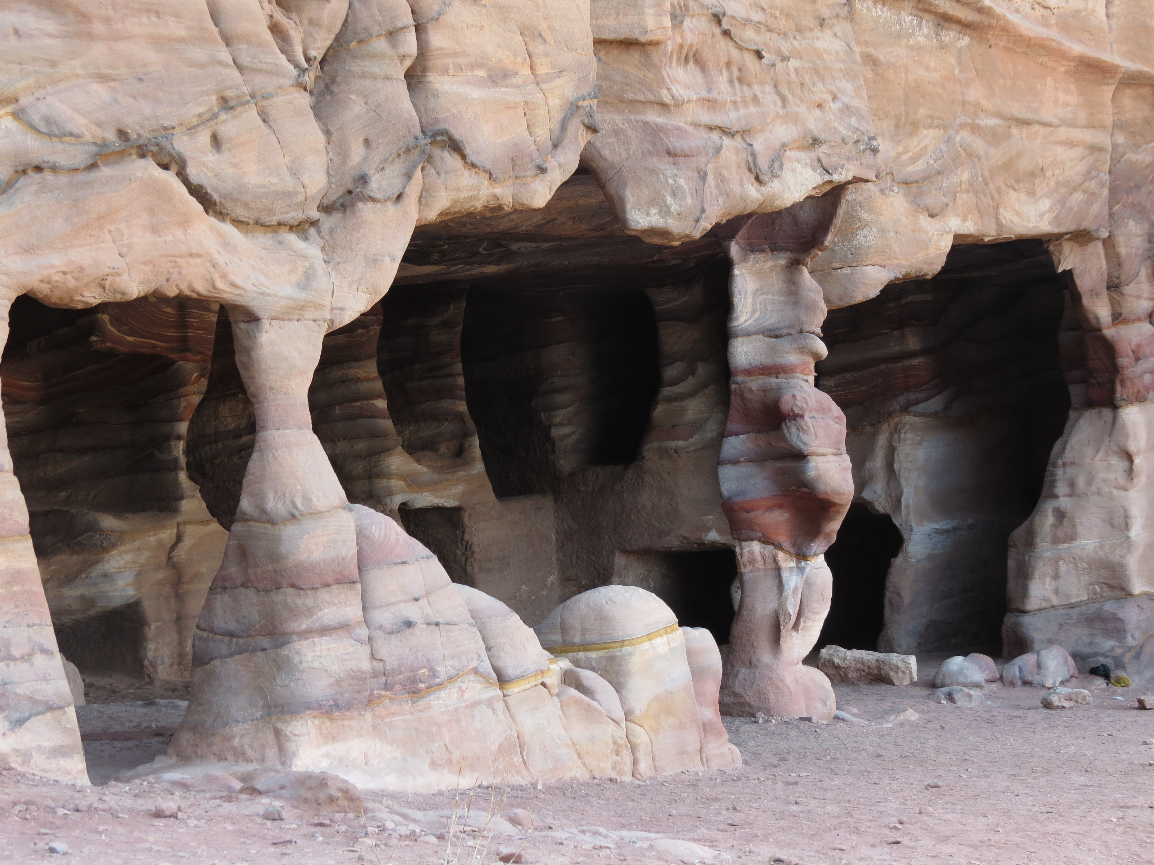 Une vue de la Jordanie.